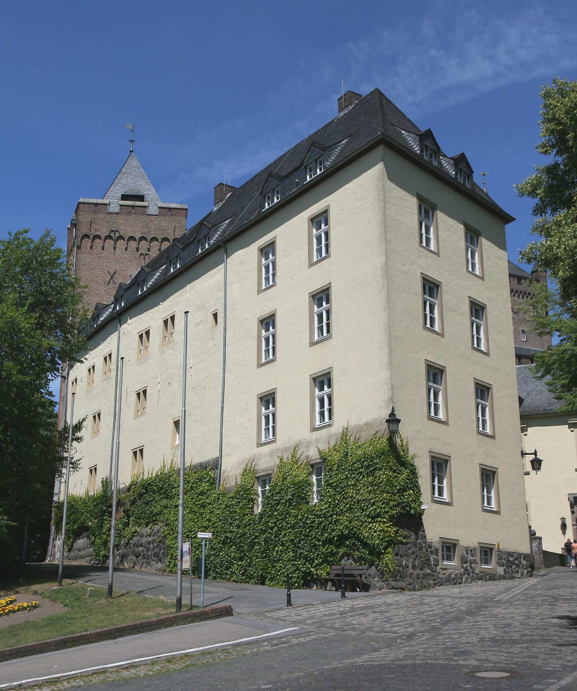 Amtsgericht Kleve, Schloßberg 1 (Schwanenburg) in Kleve.